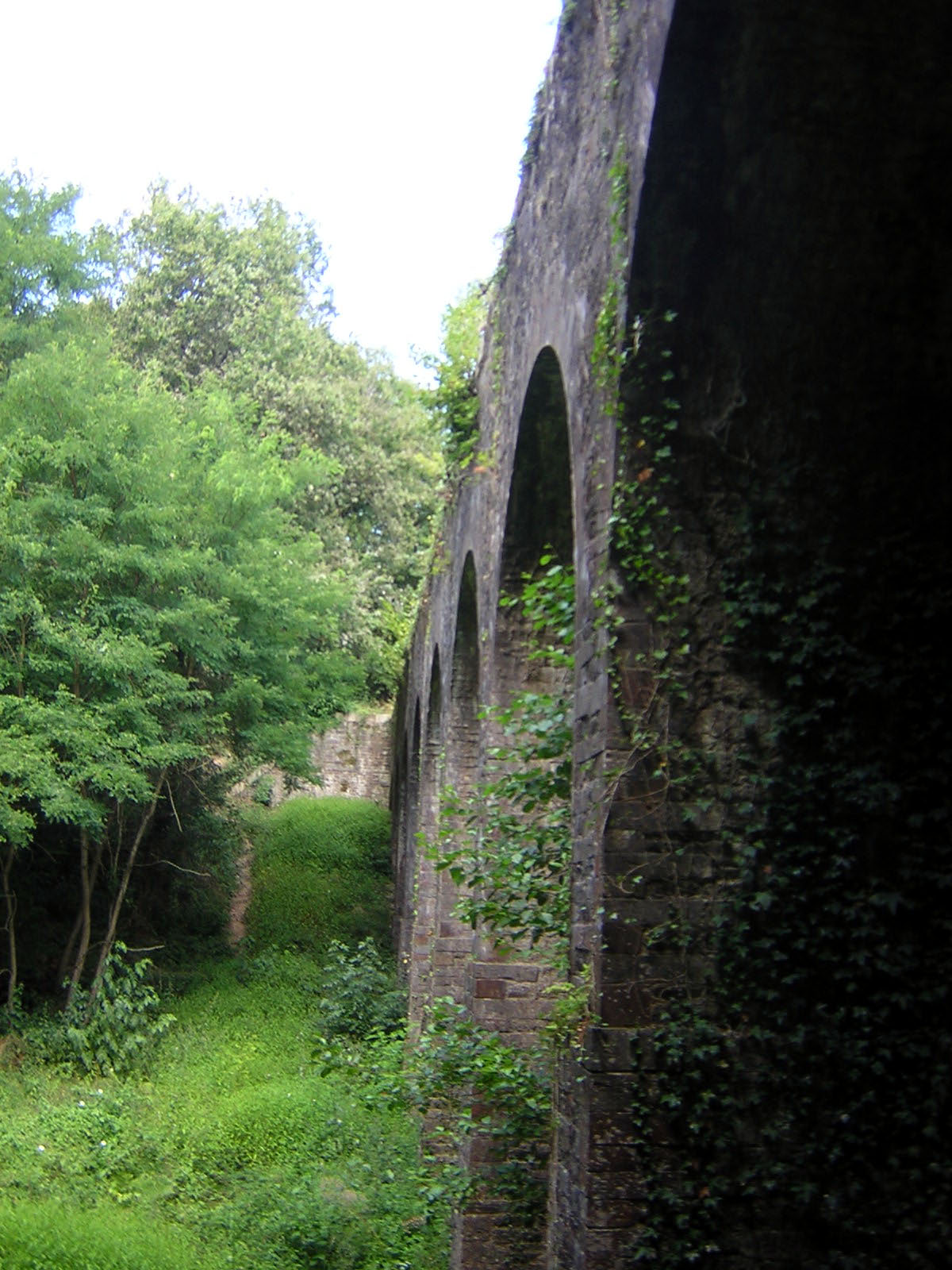 les Grandes Arcades (Joué-sur-Erdre), appelées Arcades du Gué de la Roche.